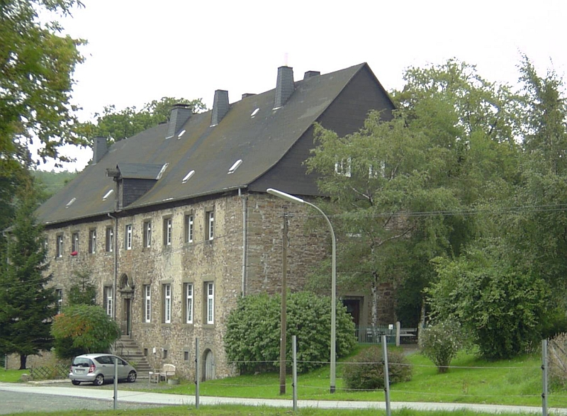 Kloster Galiläa in Meschede (Reste), Germany.